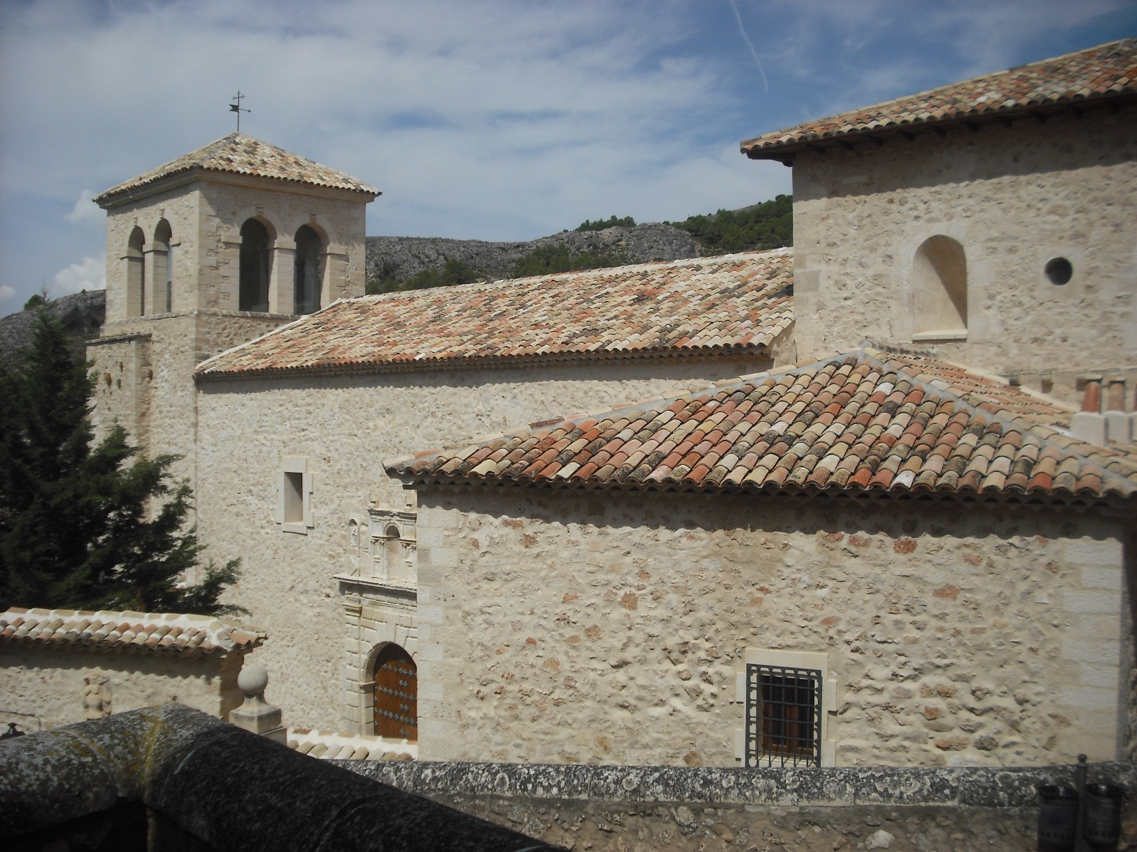 Iglesia de San Miguel.